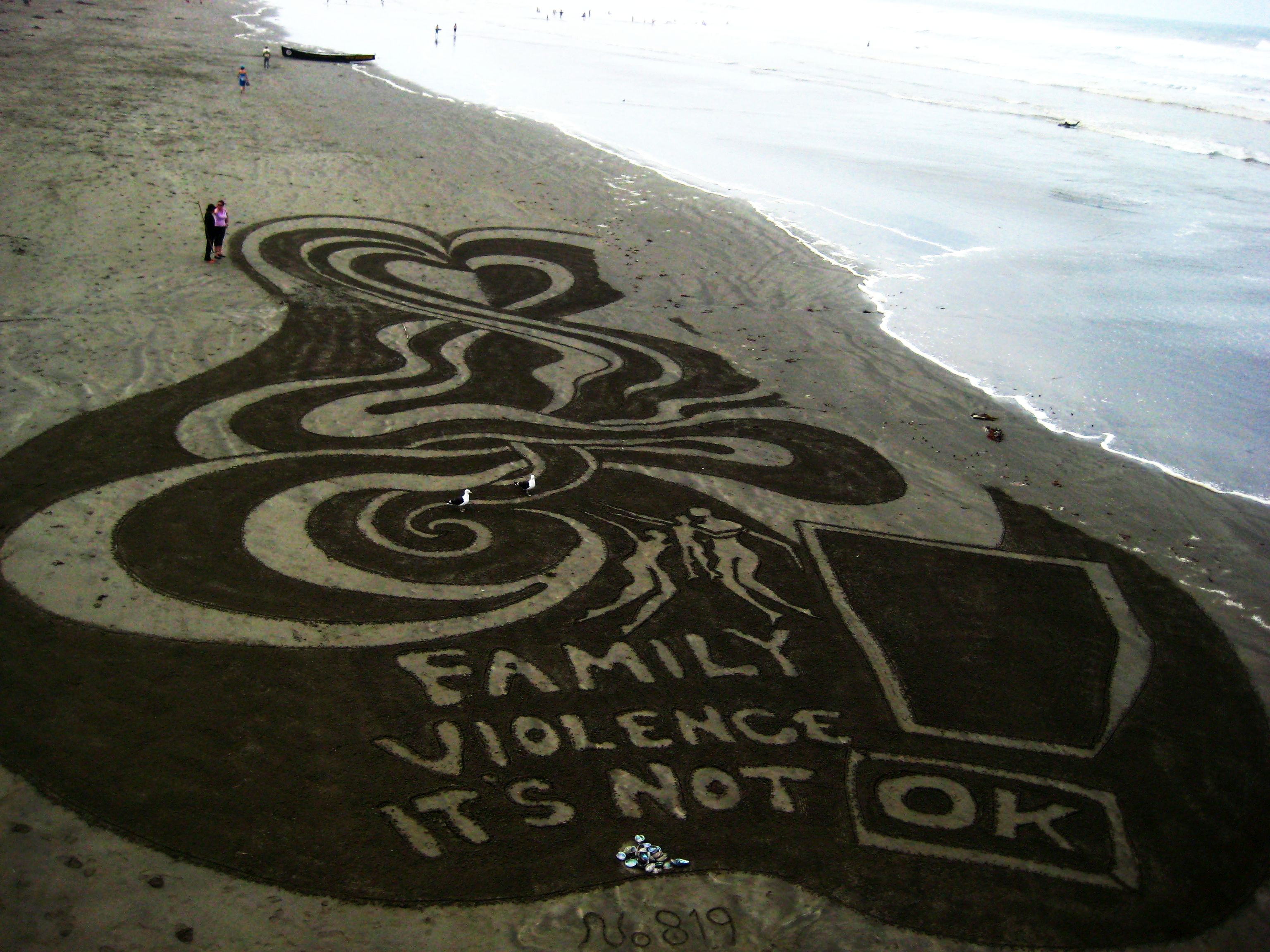 Template:Strandmalerei von Peter Donelly, dem ansässigen Sandkünstler.